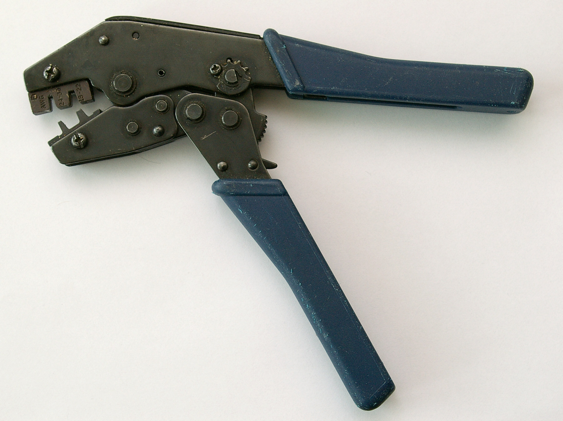 Crimpzange für Kabelkontakte AWG 18-22 sowie AWG 24-30